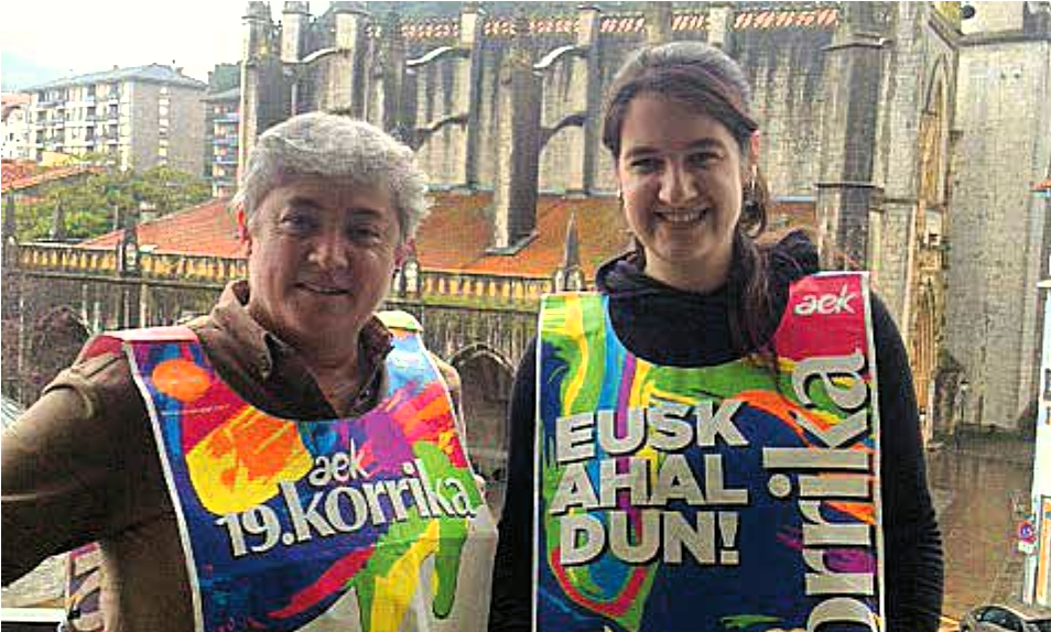 Maitane Larrauri 2014ko Korrikan parte hartzeko prest Lekeition